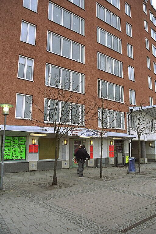 Granängsringen, butiker i höghusbebyggelse. Motiv: Tyresö Kategori: BostadsområdeGranängsringen, butiker i höghusbebyggelse.